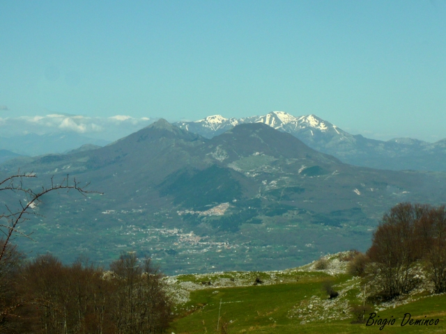 Panoramica Monti La Spina-Zaccana da P.Pedarreto Pollino. Sullo sfondo Massiccio del Sirino